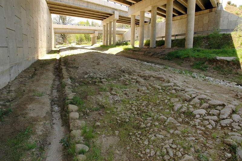 Tramo original de la calzada romana de la Vía de la Plata, Puerto de Béjar, Salamanca, España